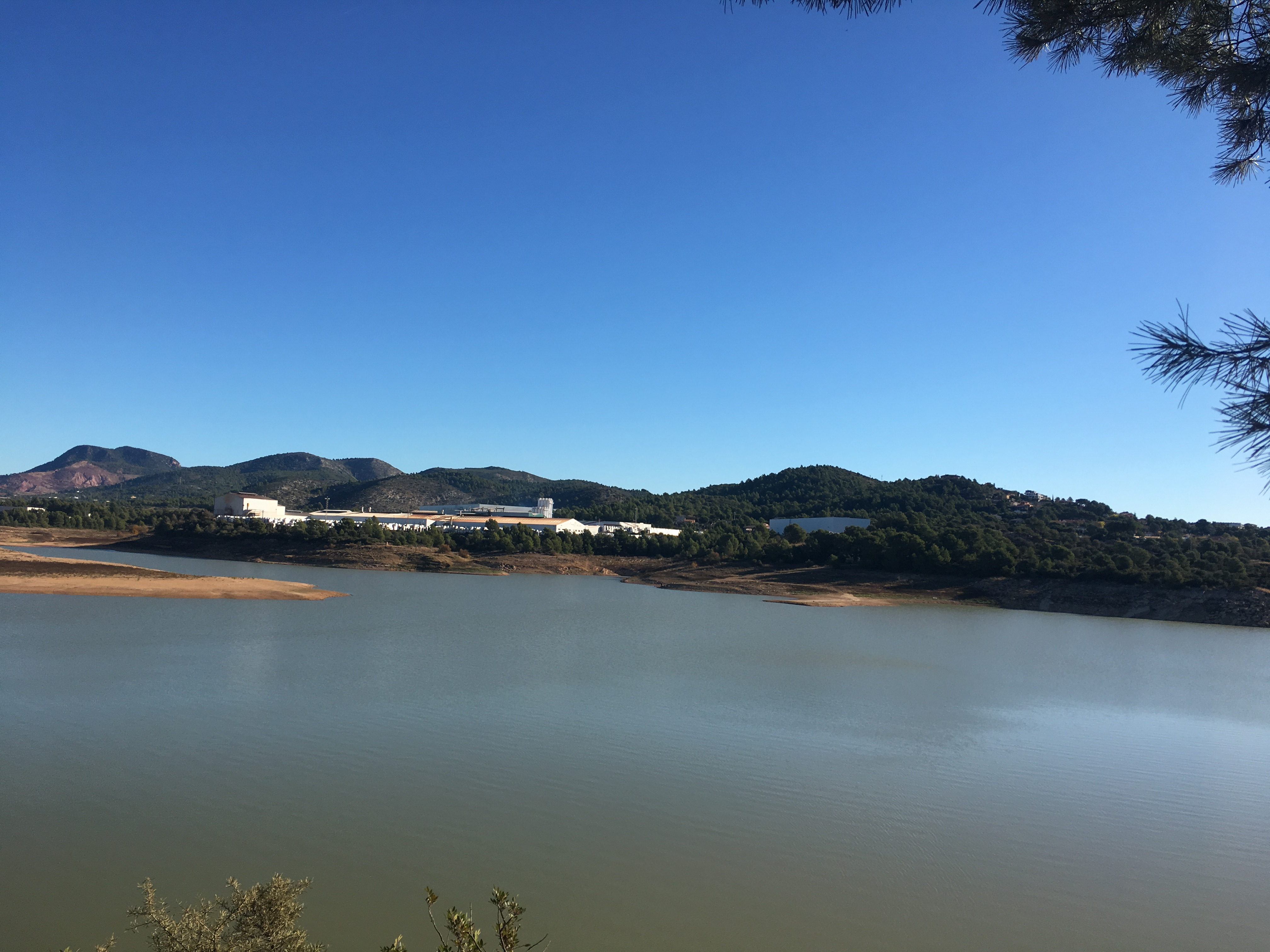 Vista de l'embassament de Maria Cristina.